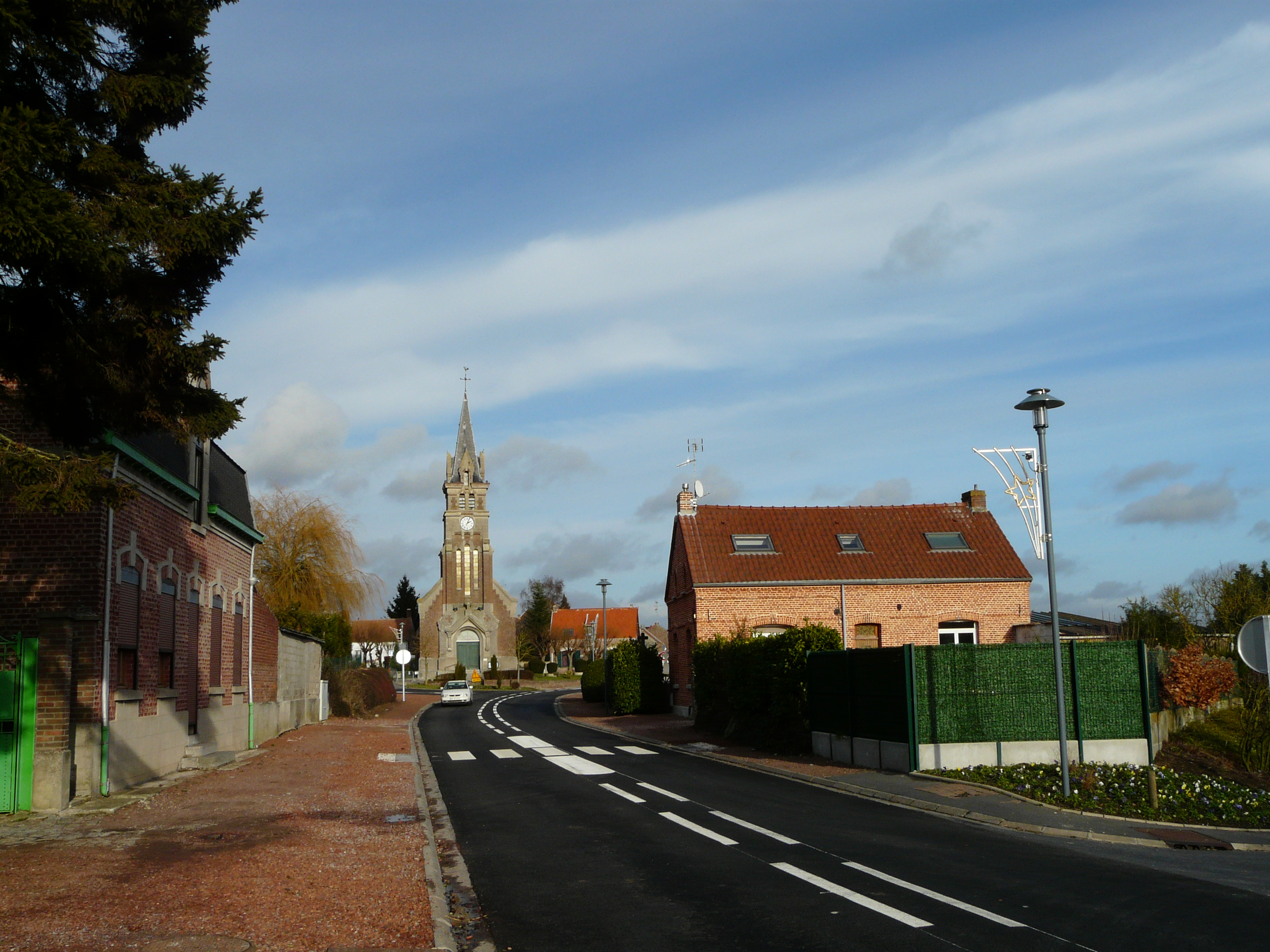 L'église et la rue Pasteur